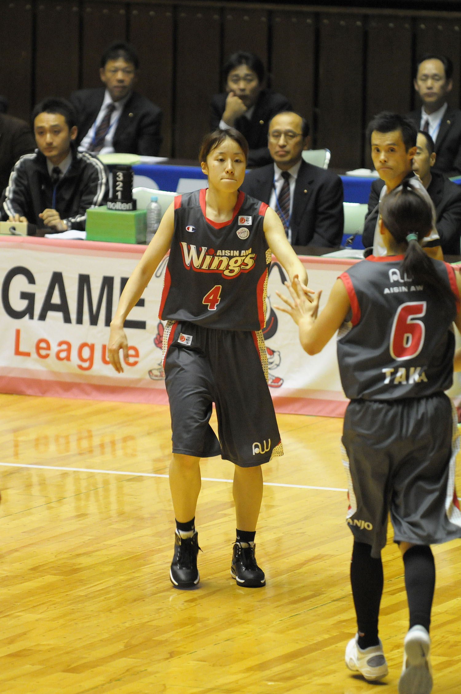 アイシンAWウィングスの前田有香選手。とどろきアリーナで。